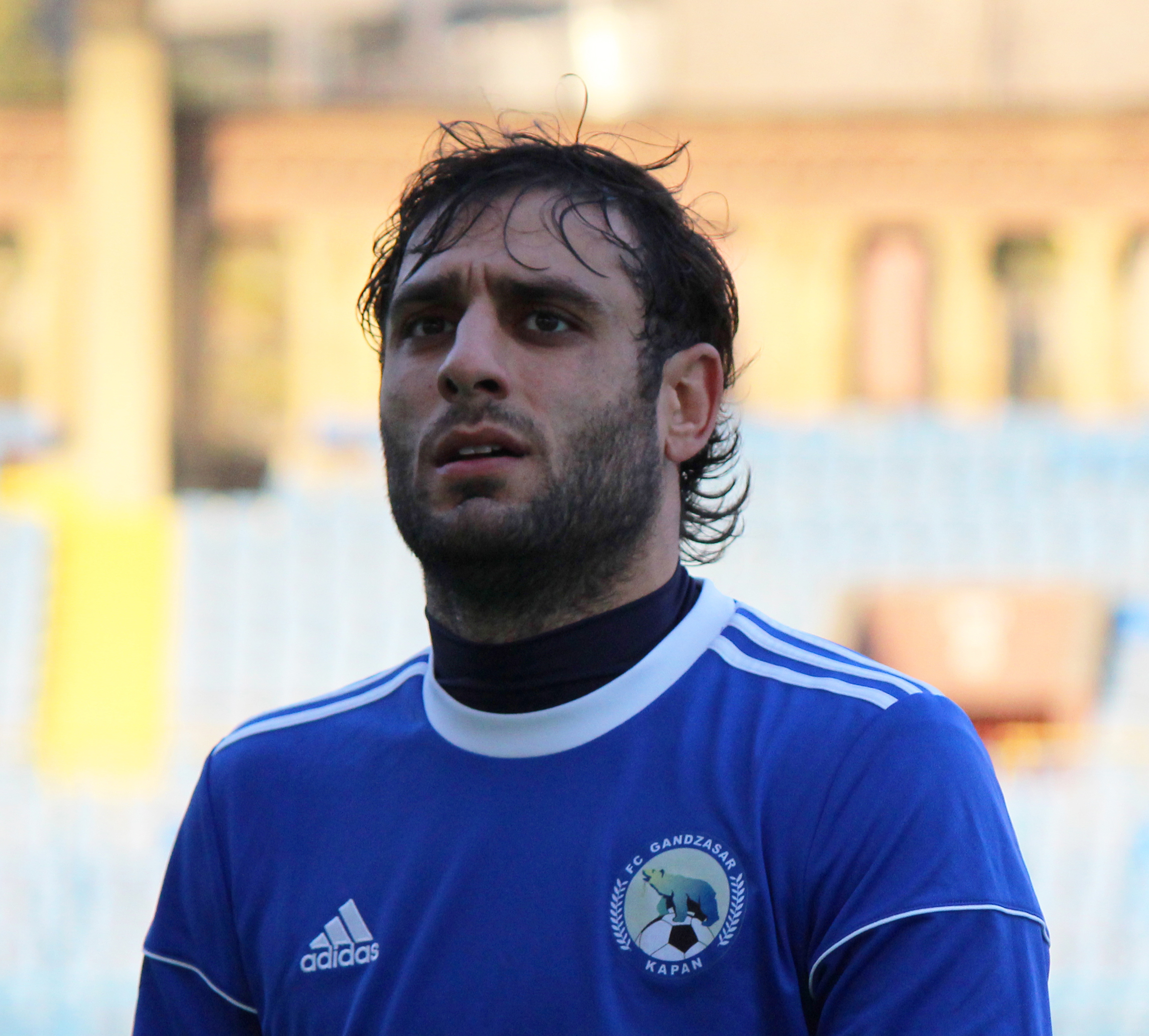 Hayk Ishkhanyan with Gandzasar Kapan FC in 2017